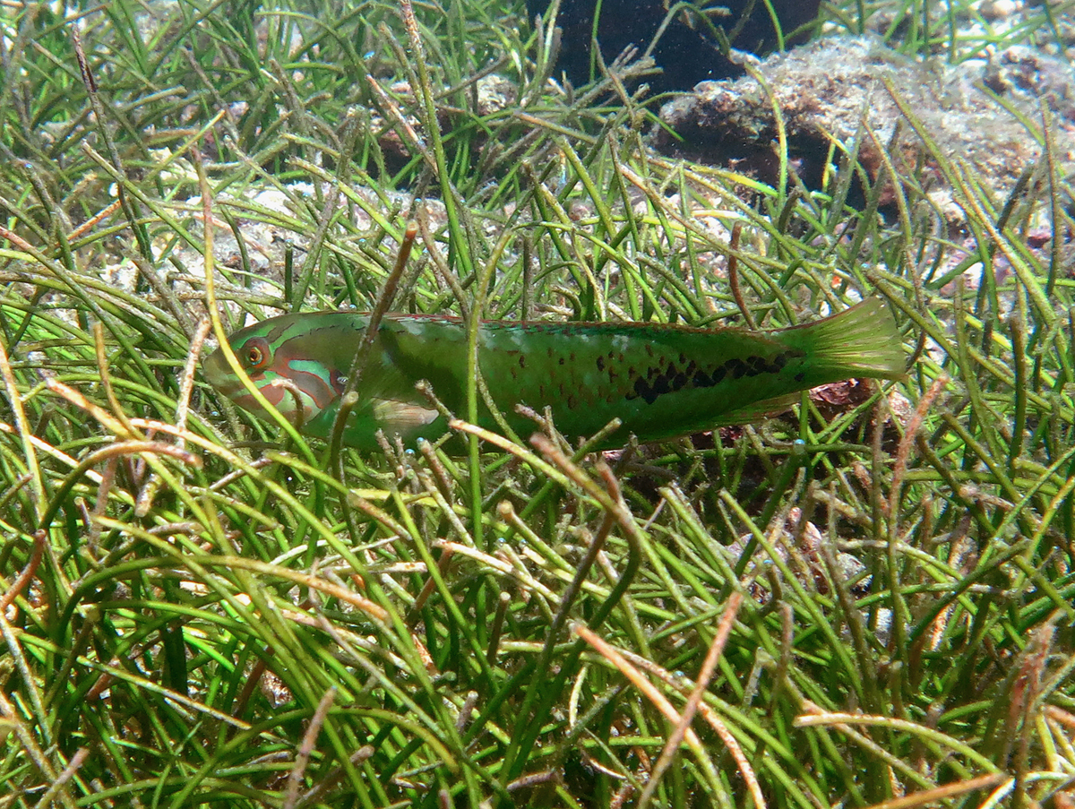 Le labre des herbiers Novaculoides macrolepidotus à la Réunion.